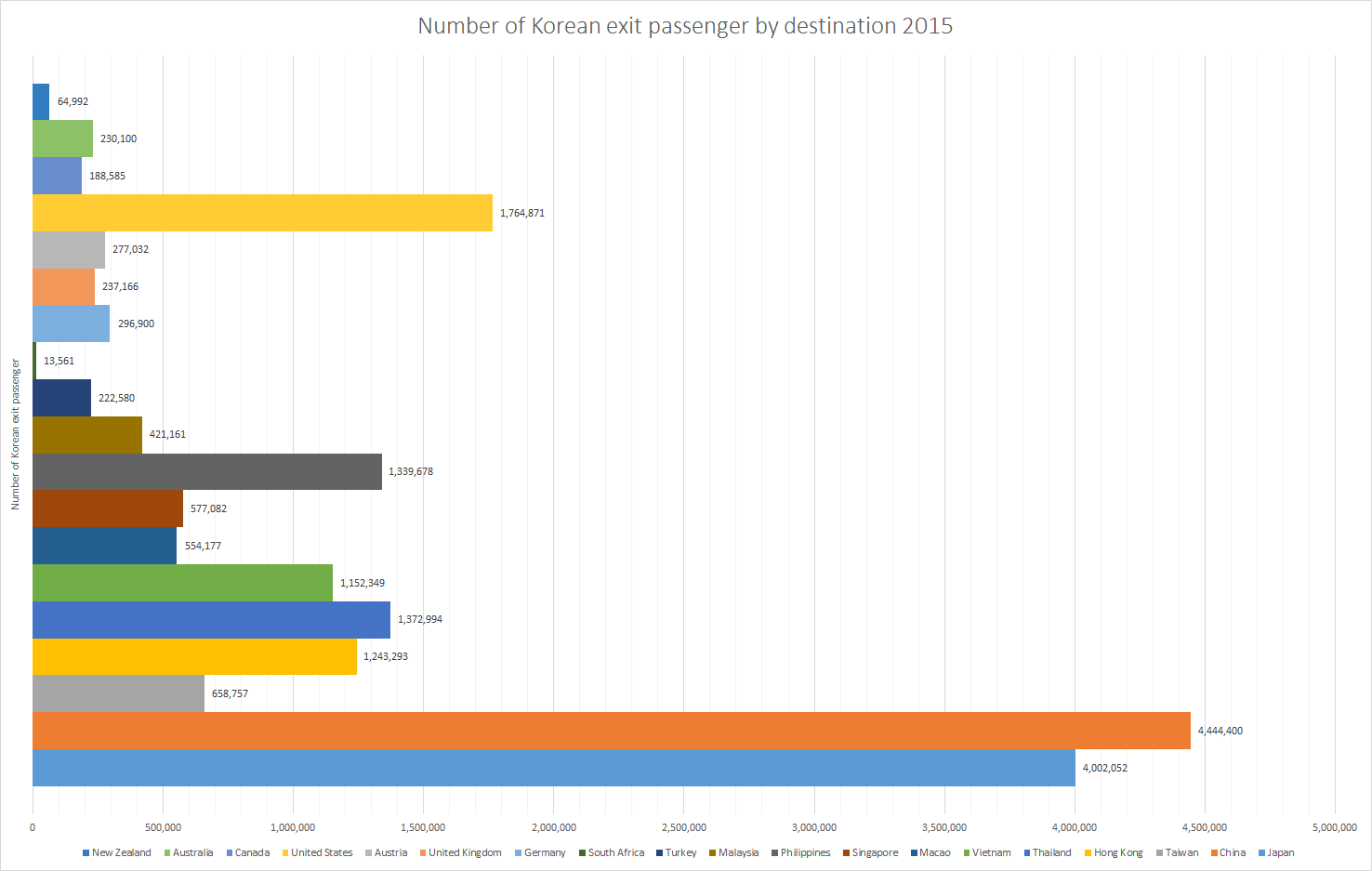 2015년도 나라별 한국인 입국 횟수